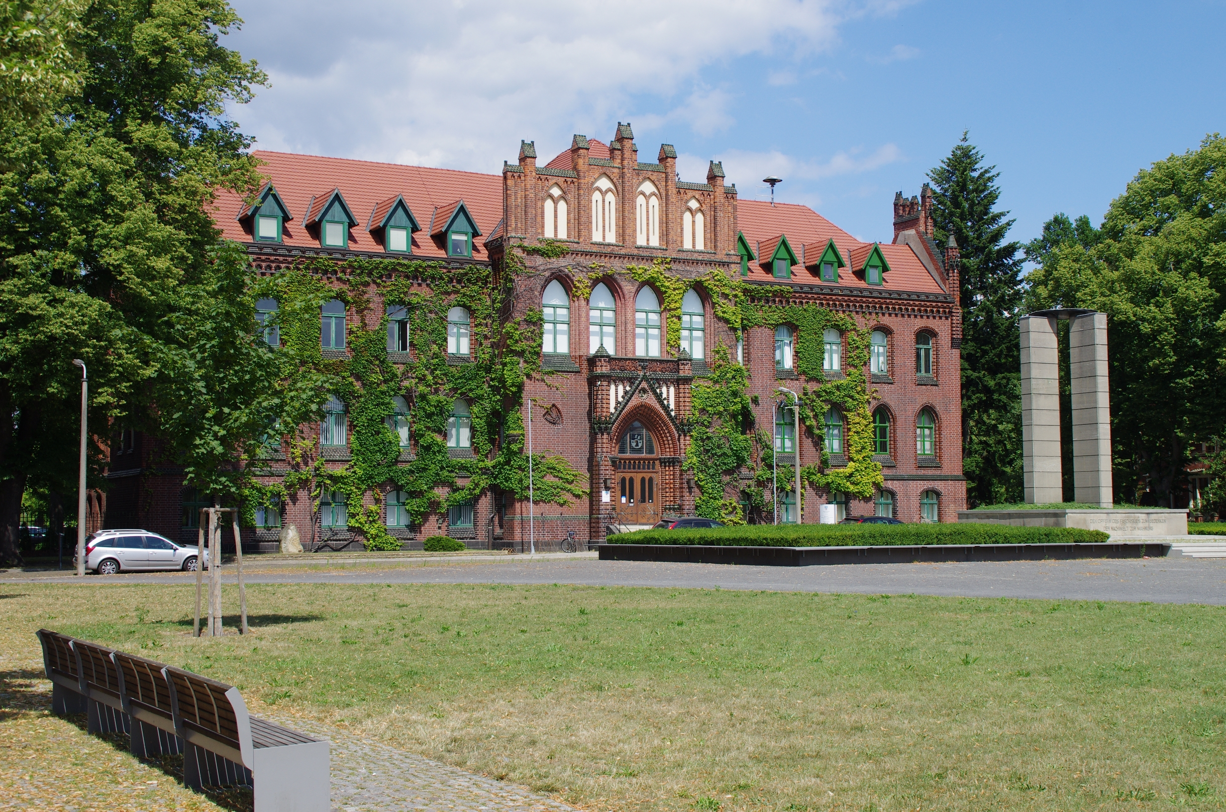 Rathenow in Brandenburg. Das Haus Platz der Freiheit 1 steht unter Denkmalschutz.